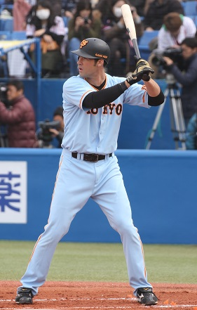 ジャイアンツぎゃれっと選手